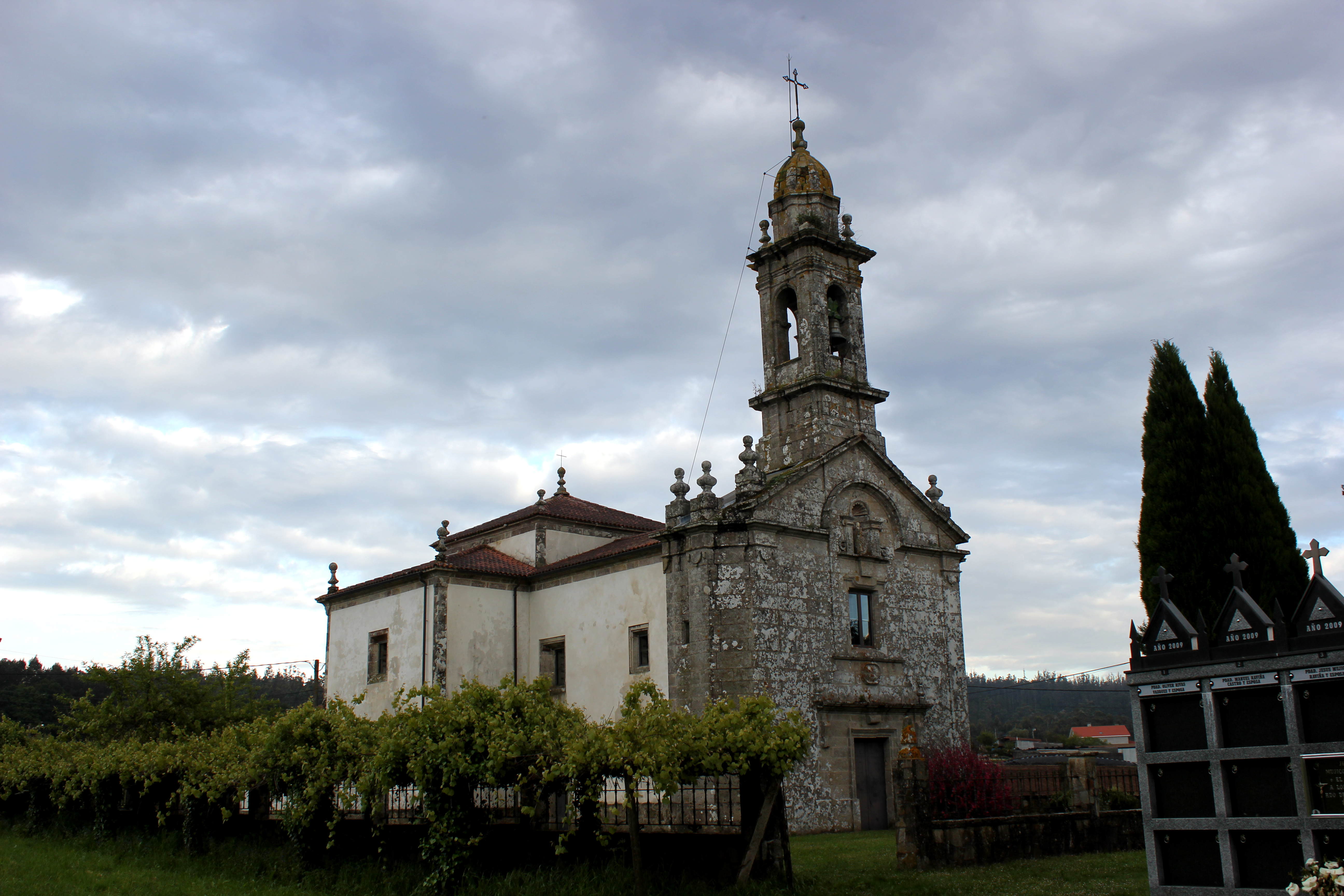 Igrexa de Lamas, Boqueixón.